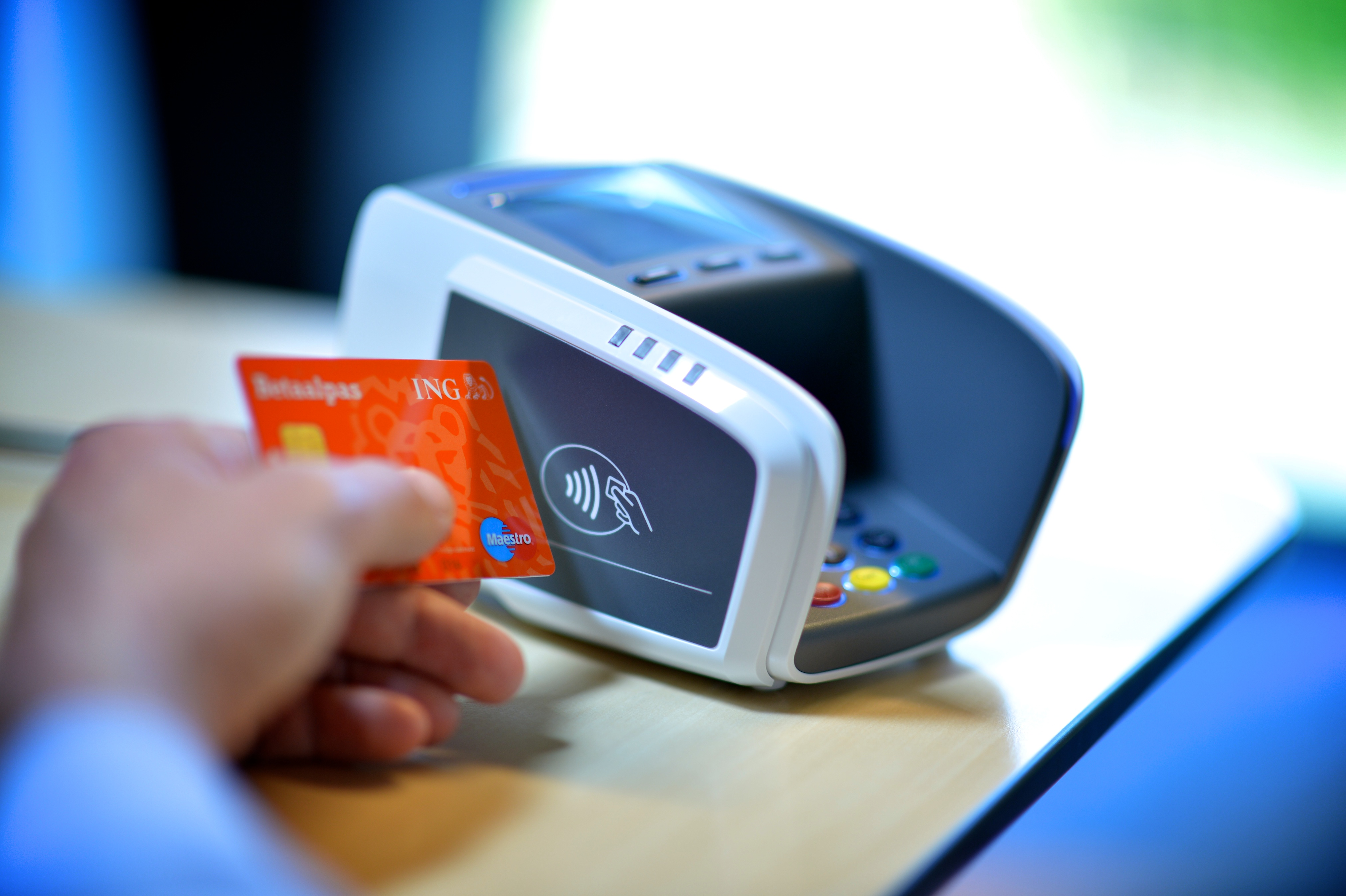 Een pinautomaat met NFC-chiplezer en pinpas.